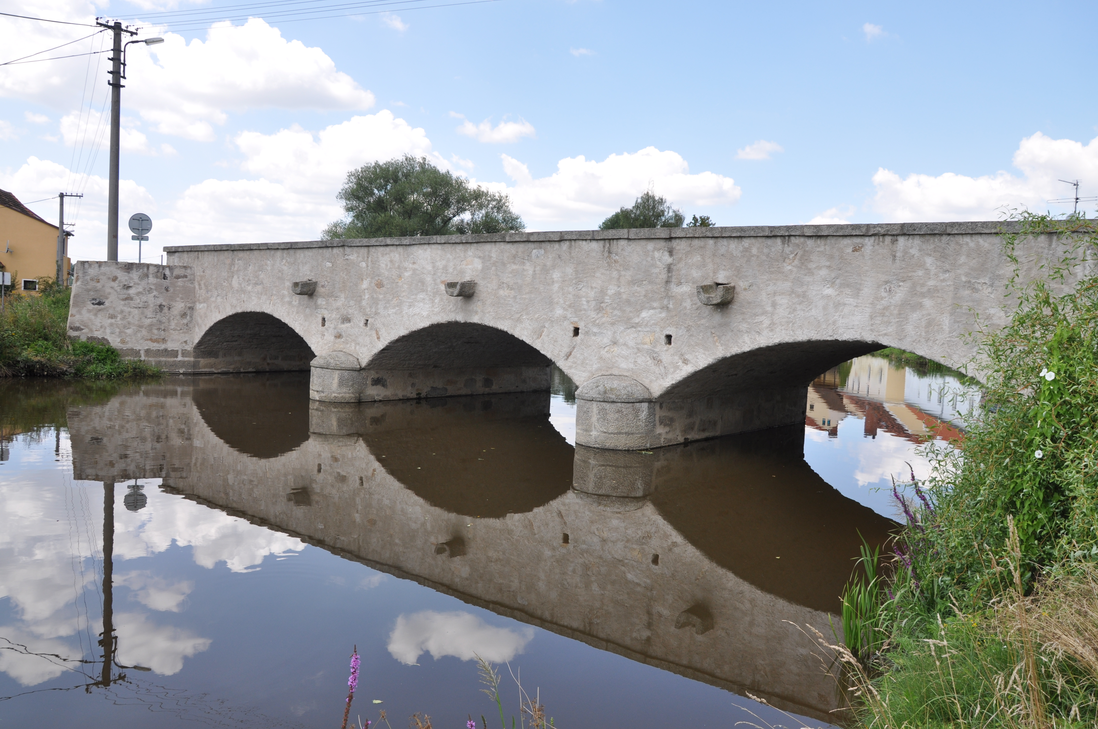 Klasicistní kamenný most přes řeku Blanici. Putim. Okres Písek. Česká republika.